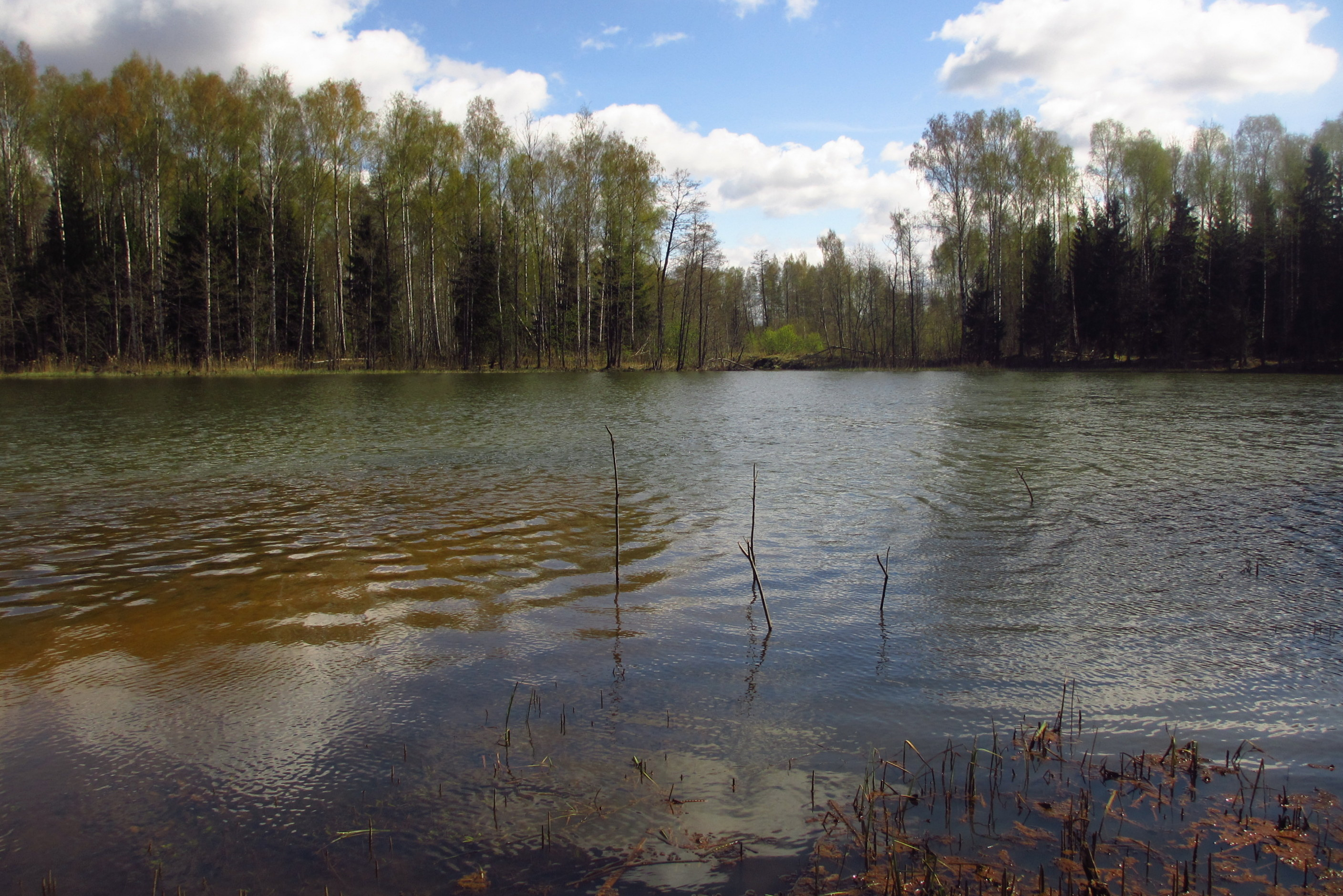 Kurtna Särgjärv Kurtna MKAl